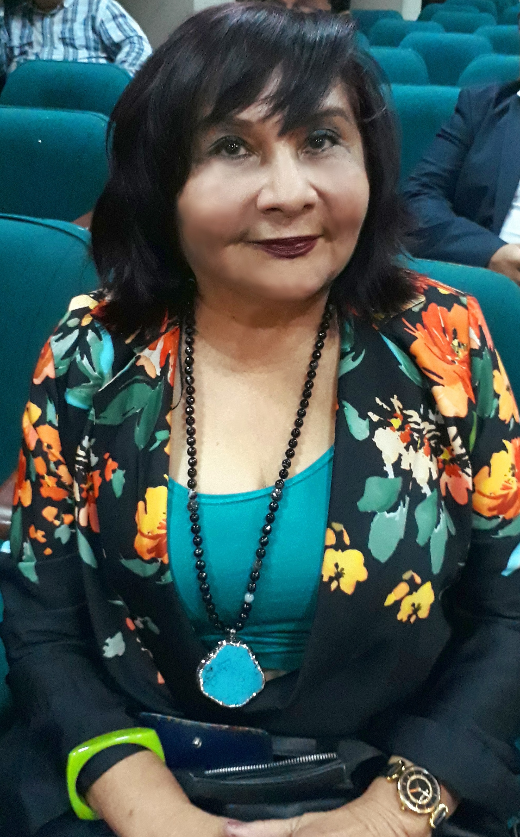 Sonia Manzano Vela en 2018